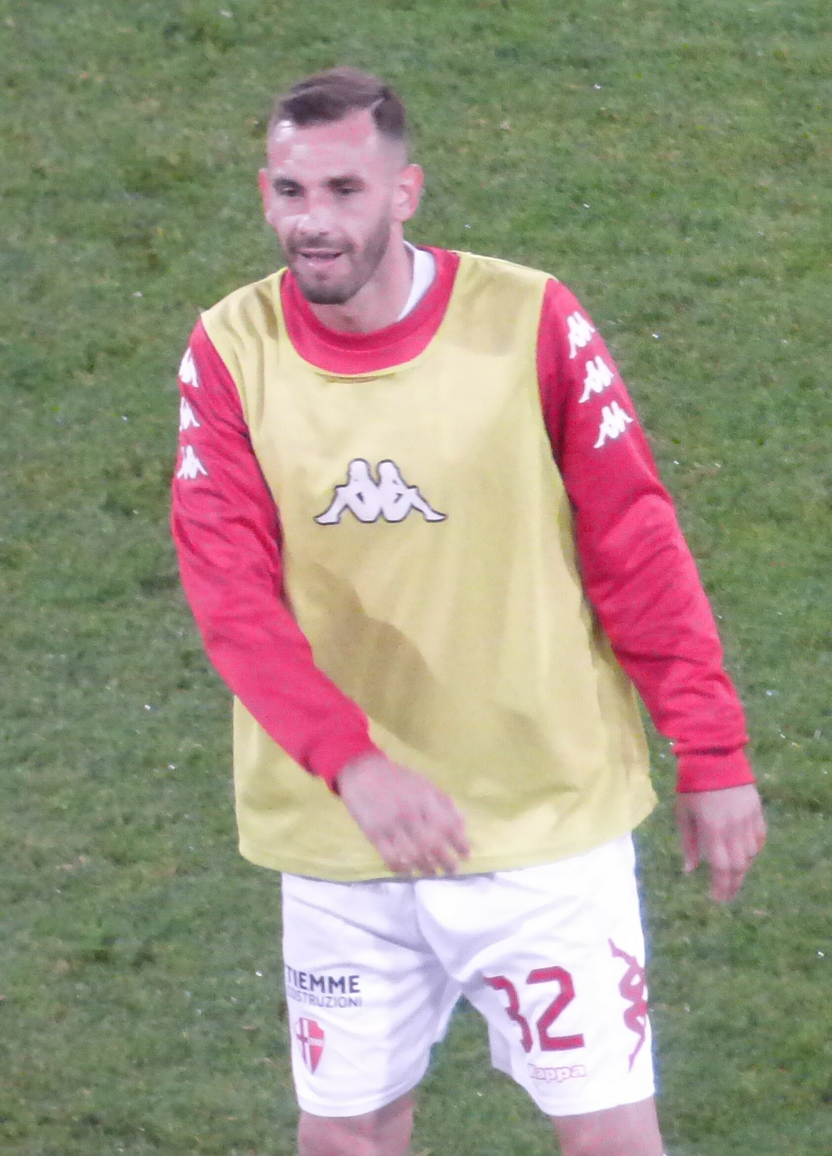 Francesco Della Rocca lors du match amical RC Lens - Calcio Padova, le 11 octobre 2018 au Stade Bollaert-Delelis de Lens.